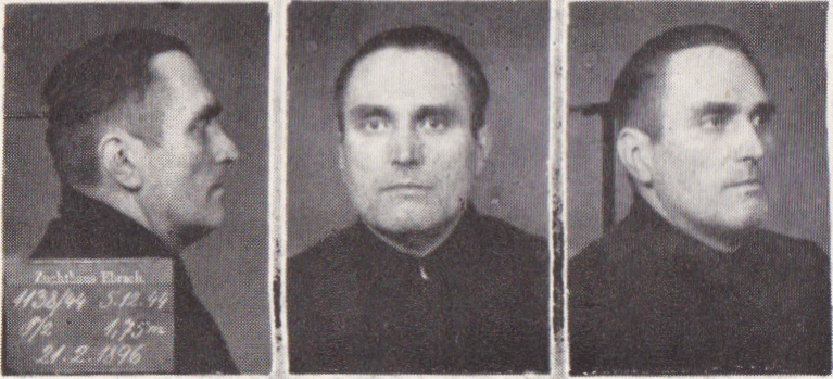 Trestanecká fotografie Karla Josefa Beneše z káznice Ebrach ze dne 5. prosince 1944. PhDr. Karel Josef Beneš (* 21. února 1896, Praha – 27. března 1969, Rožmitál pod Třemšínem) český spisovatel a scenárista. Autor historických děl, psychologických románů a také autor filmových scénářů. Publikoval taktéž články o hudbě. Po okupaci Československa se Karel Josef Beneš (* 21. února 1896, Praha – 27. března 1969, Rožmitál pod Třemšínem) a jeho žena Ervína Brokešová (* 27. ledna 1900, Praha – 19. října 1987, Rožmitál pod Třemšínem) zapojili (v dubnu 1939) do ilegální odbojové činnosti v organizaci Petiční výbor Věrni zůstaneme (PVVZ). Karel Josef Beneš byl v prosinci 1941 zatčen. Jeho žena pak absolvovala řadu výslechů. Navzdory tomu pokračovala v odbojové činnosti pod krycím jménem Foška jako spojka mezi Prahou a Rožmitálem. Mimo to se pokoušela navštěvovat vězněného manžela, aby mu ulehčila jeho věznění. Podařilo se jí proniknout i na soudní řízení v Drážďanech v roce 1944, kde byl jejímu muži původně navrhován trest smrti. Nakonec byl odsouzen k sedmi letům žaláře (postupně věznice: Pankrác, Terezín, Gollnow, Ebrach, Straubing). Z nacistického vězení se šťastně vrátil v květnu 1945. Za svou odbojovou činnost byl Karel Josef Beneš vyznamenán Československým válečným křížem 1939.